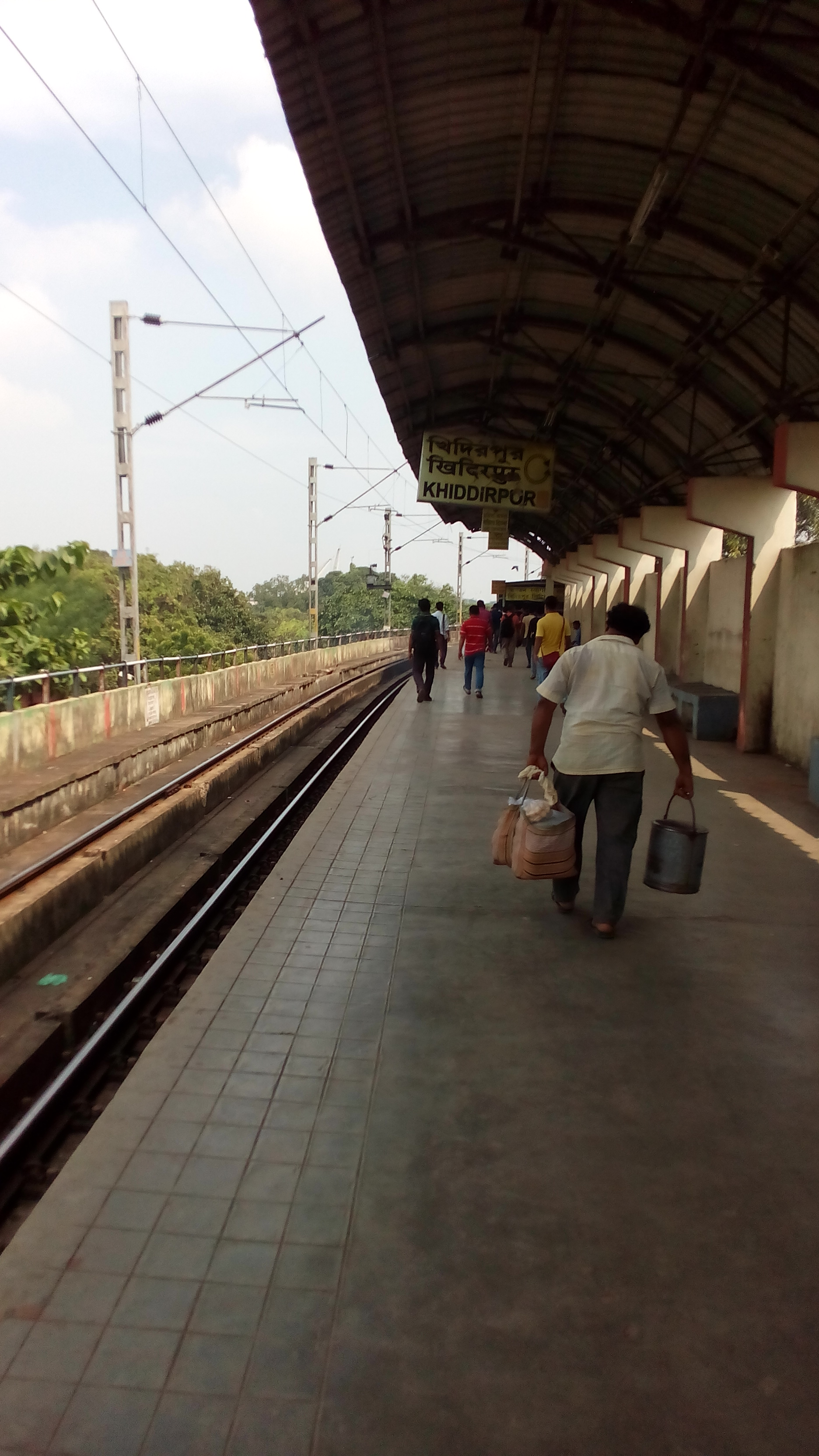 খিদিরপুর রেল স্টেশন